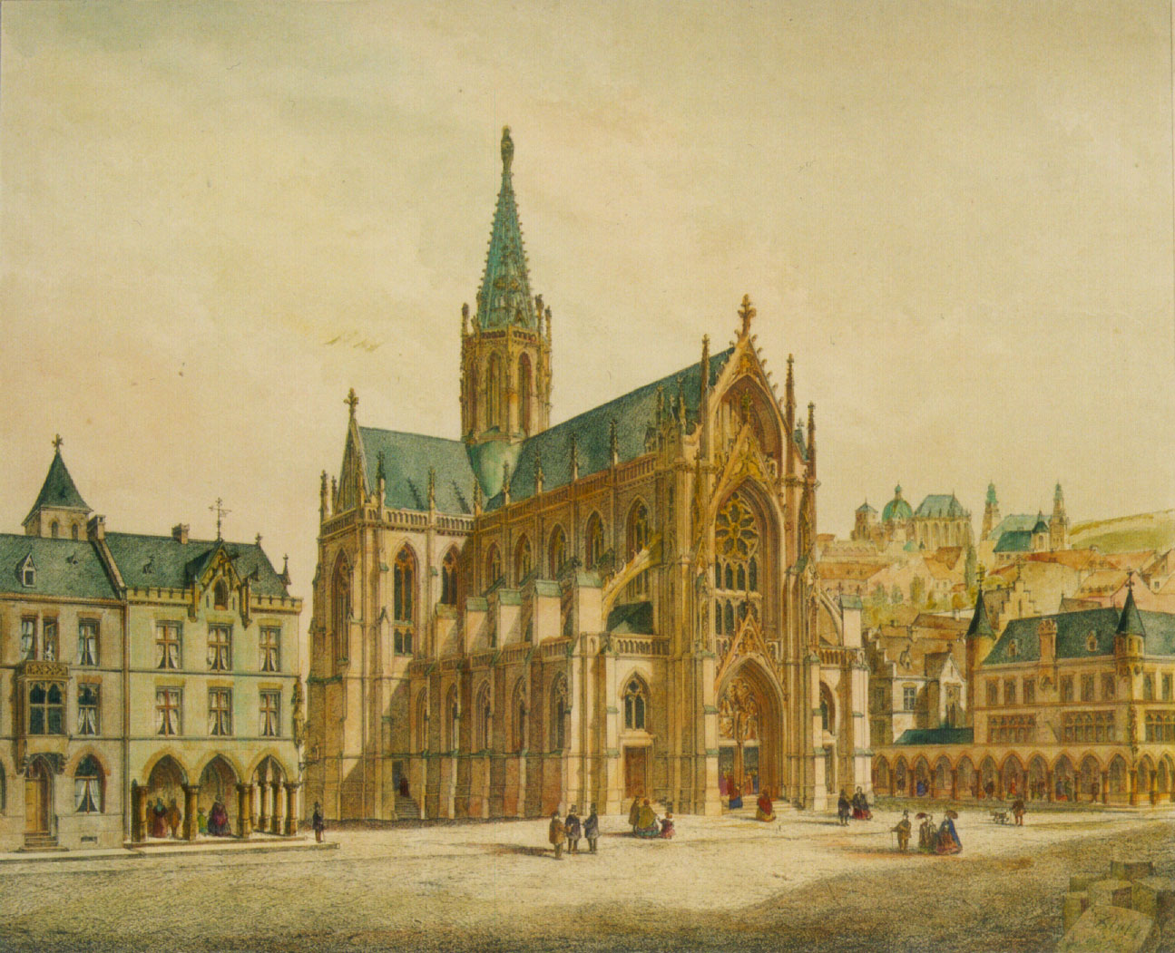 Aachen: Kath. Pfarrkirche St. Marien, Kupferstich